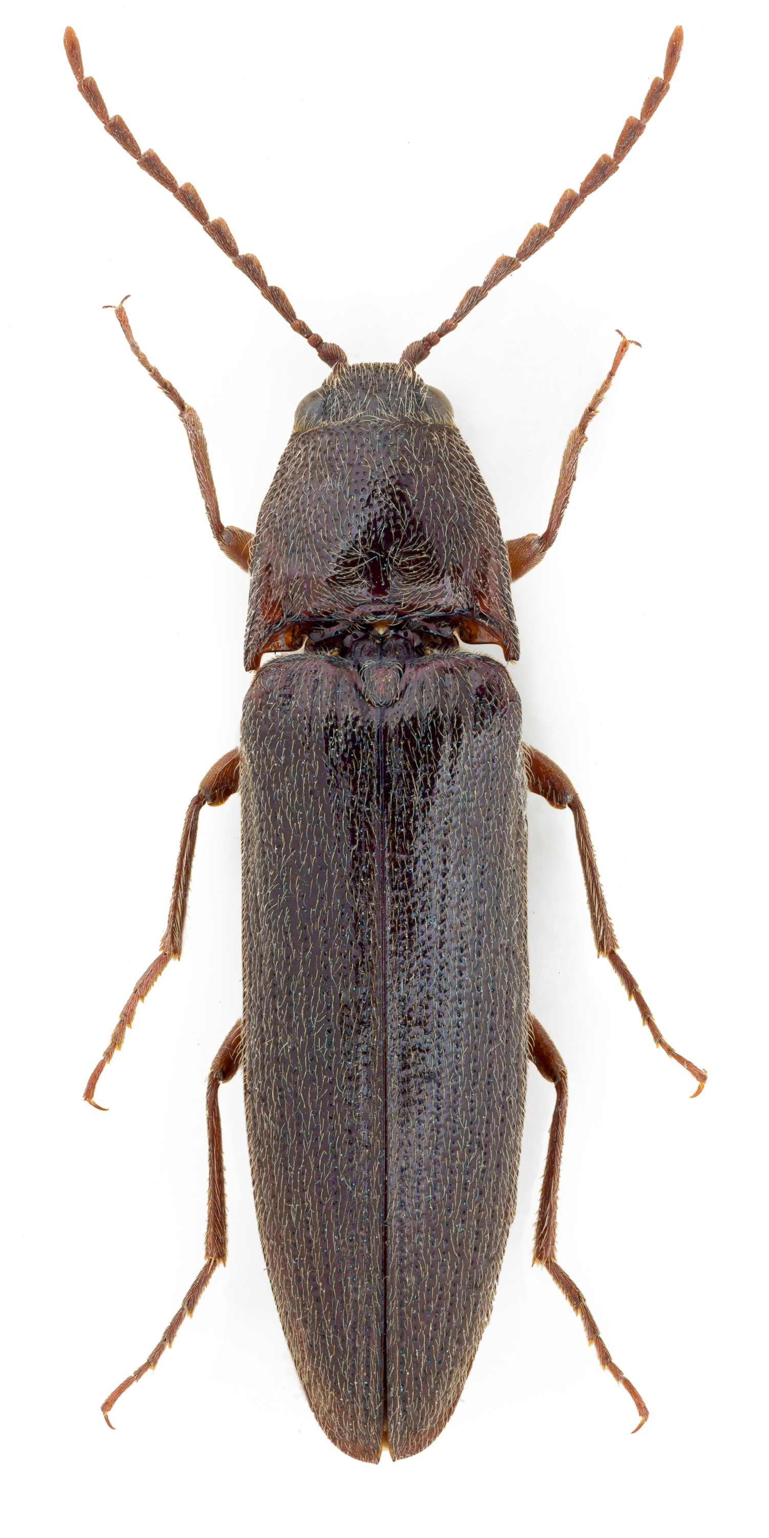 Melanotus castanipes, male.